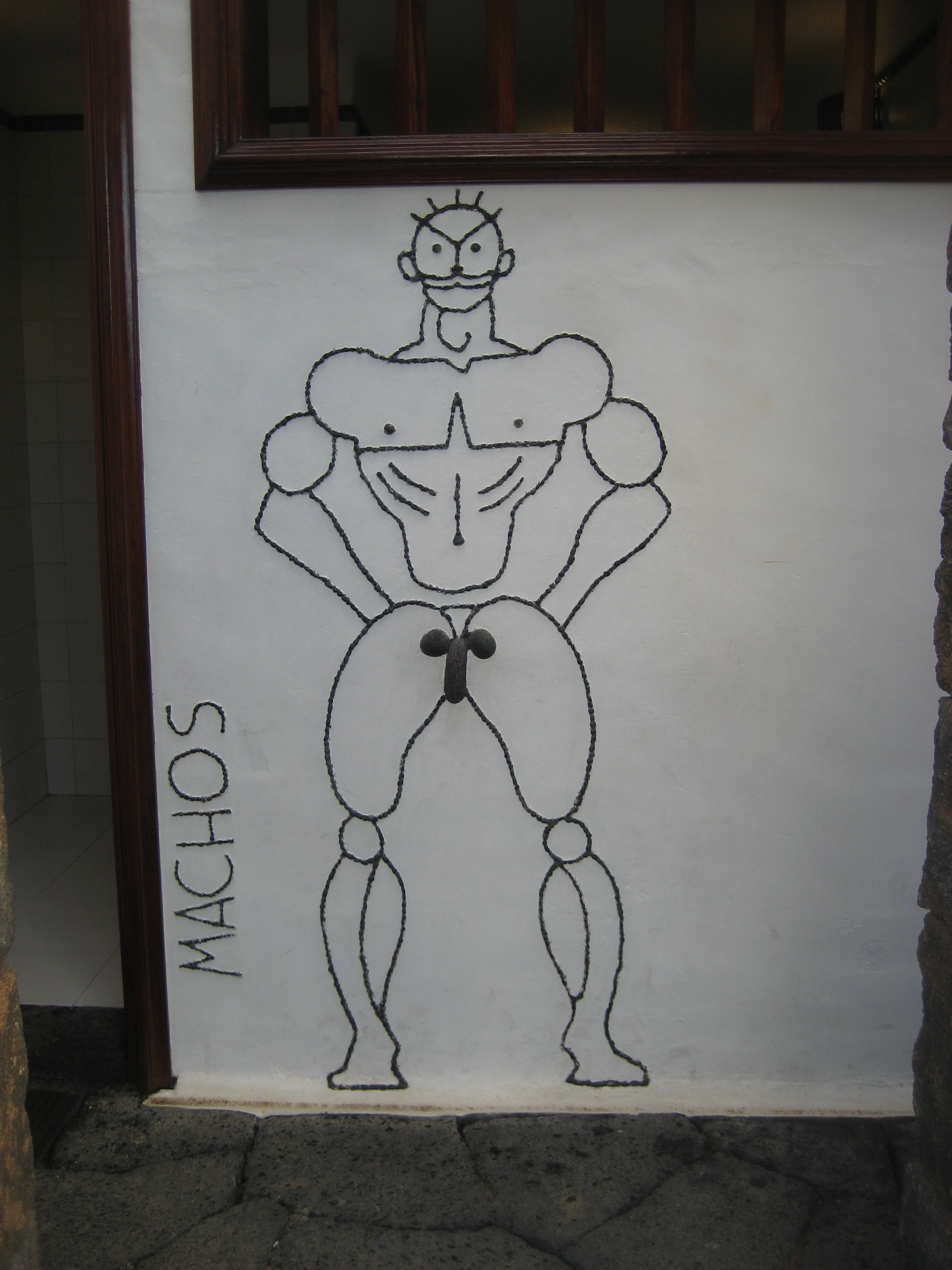 Vor dem Eingang zu einer Toilette auf Lanzarote